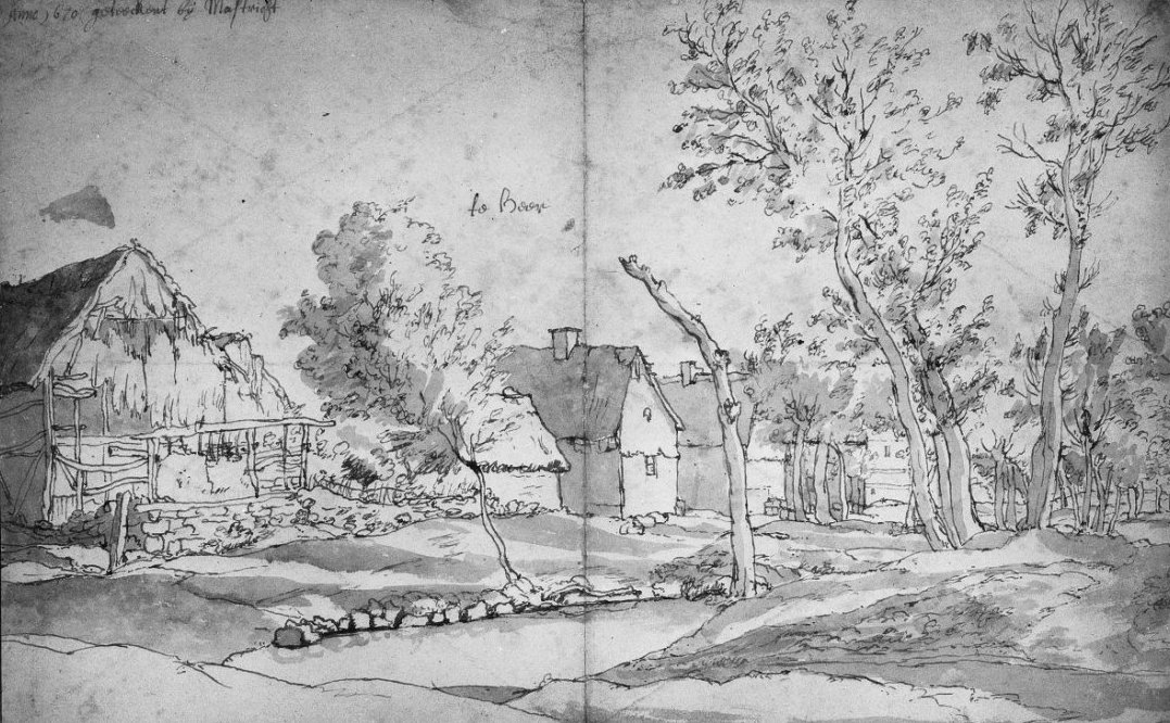 Overzichten: dorpsbeeld anno 1670